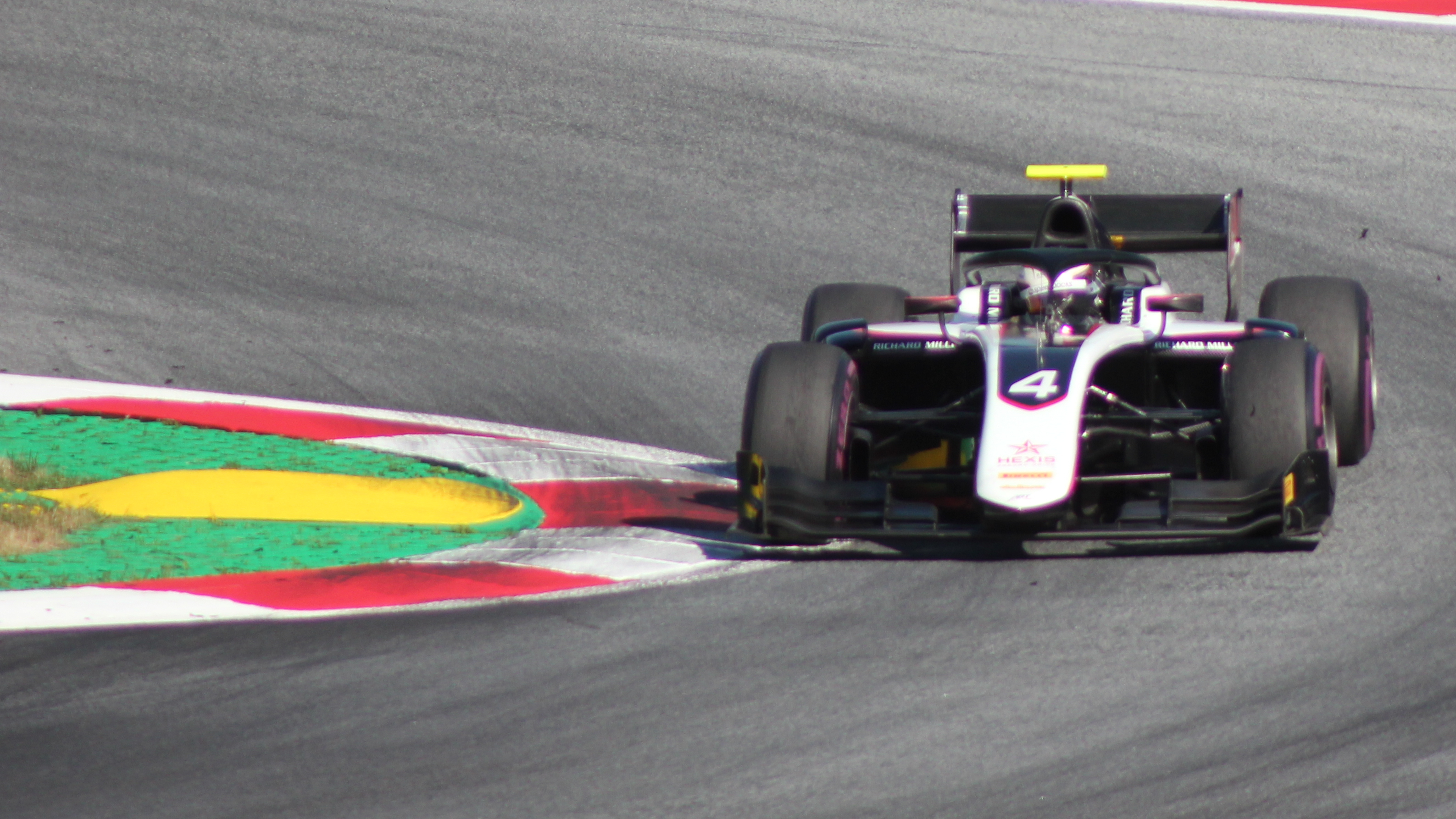 De Vries beim Rennwochenende in Österreich 2019